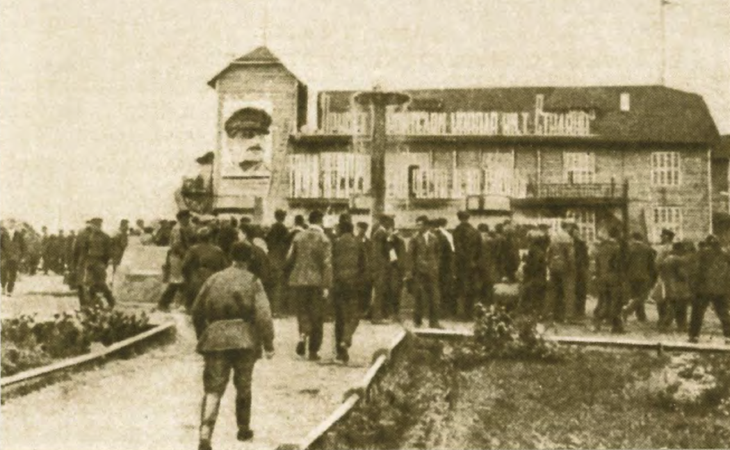 В конце 1950-х на улице Большевисткой на месте клуба "Дмитлага" был построен Дом культуры "Дмитровского экскаваторного завода". Сейчас это ДК "Современник". Надпись на здании:Привет строителям канала им. т. Сталина